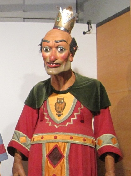 Gegant Boig de Solsona - Exposició Comença la festa! - Igualada 17 de novembre de 2011